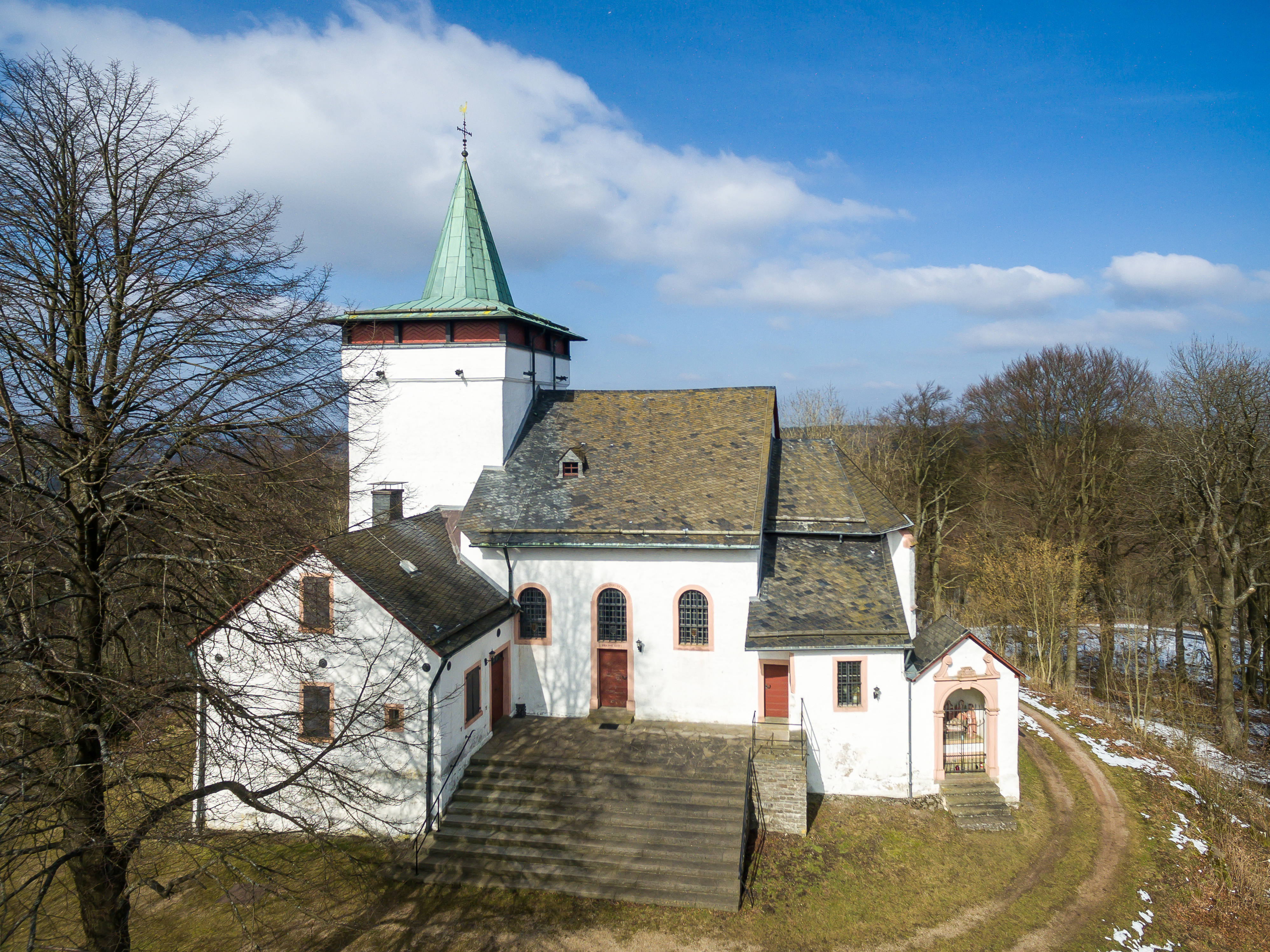 St. Michael auf dem Michelsberg/Michelsbergkapelle